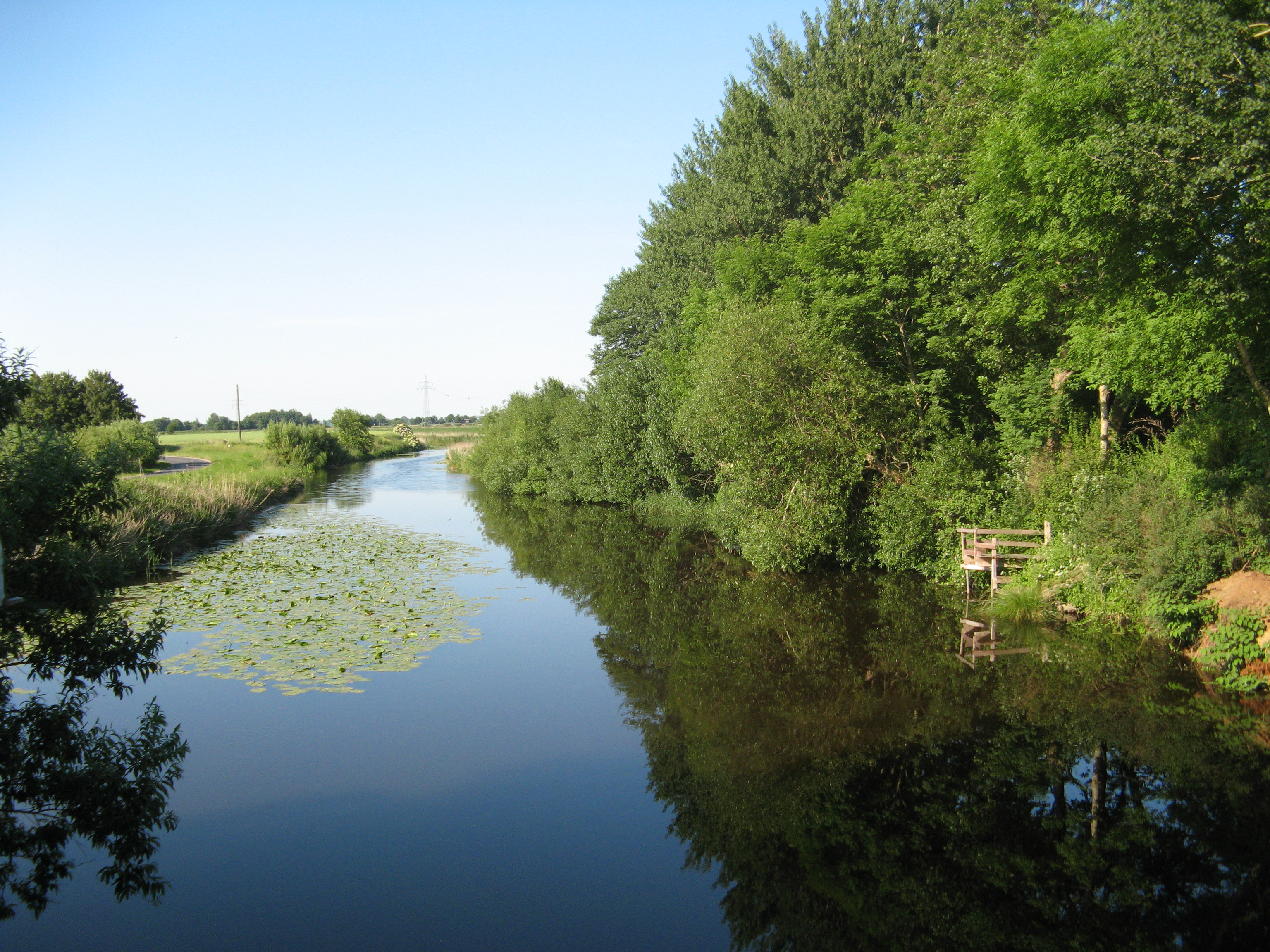 Broklandsau River bei Dammbrück (Fedderingen)